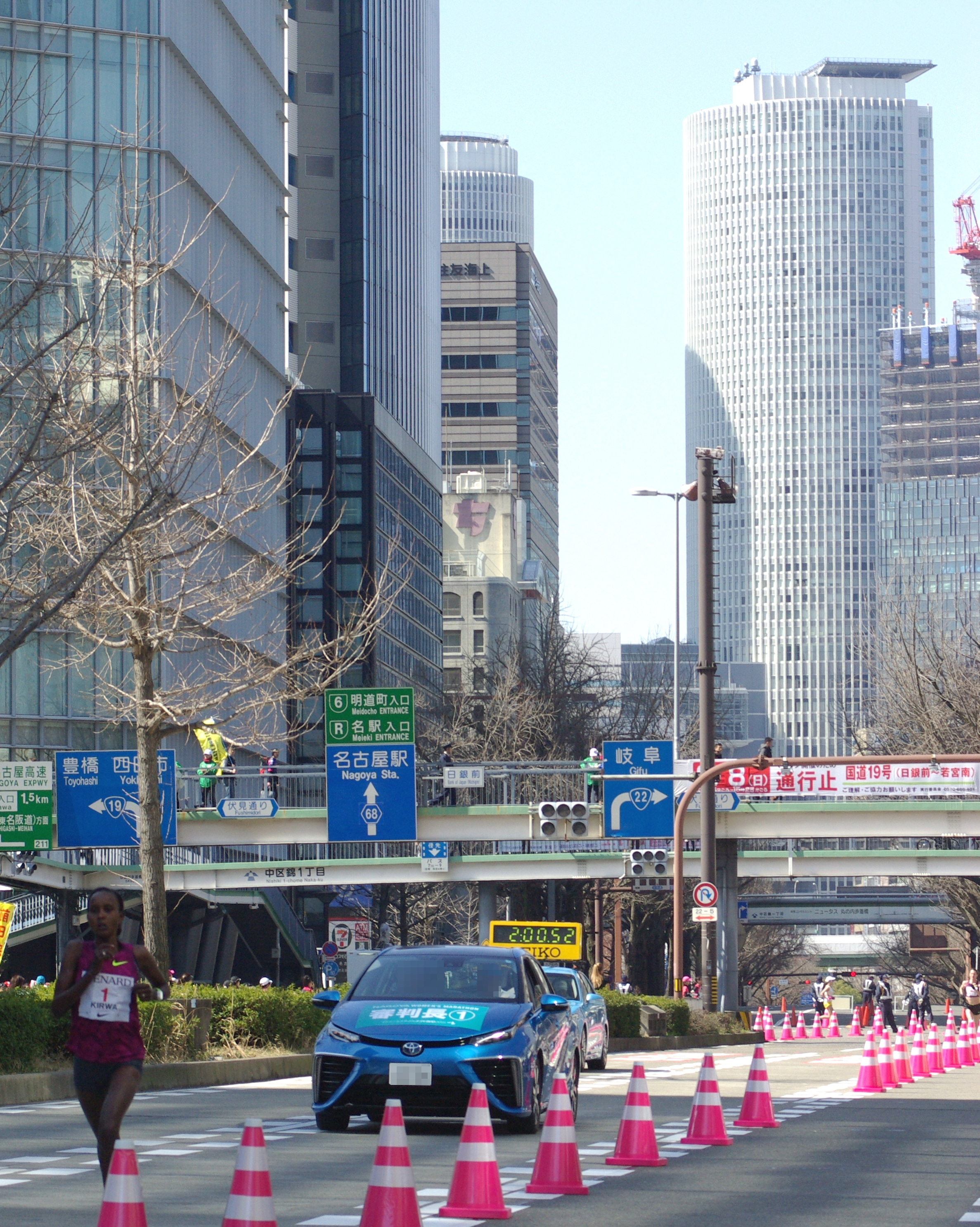 名古屋ウィメンズマラソンでトップを走るキルワ選手（バーレーン）。背後にJRセントラルタワーズ